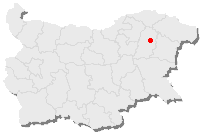 Плиска